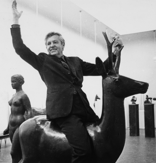 portrett, mann, billedhugger, sittende på hjorteskulptur.